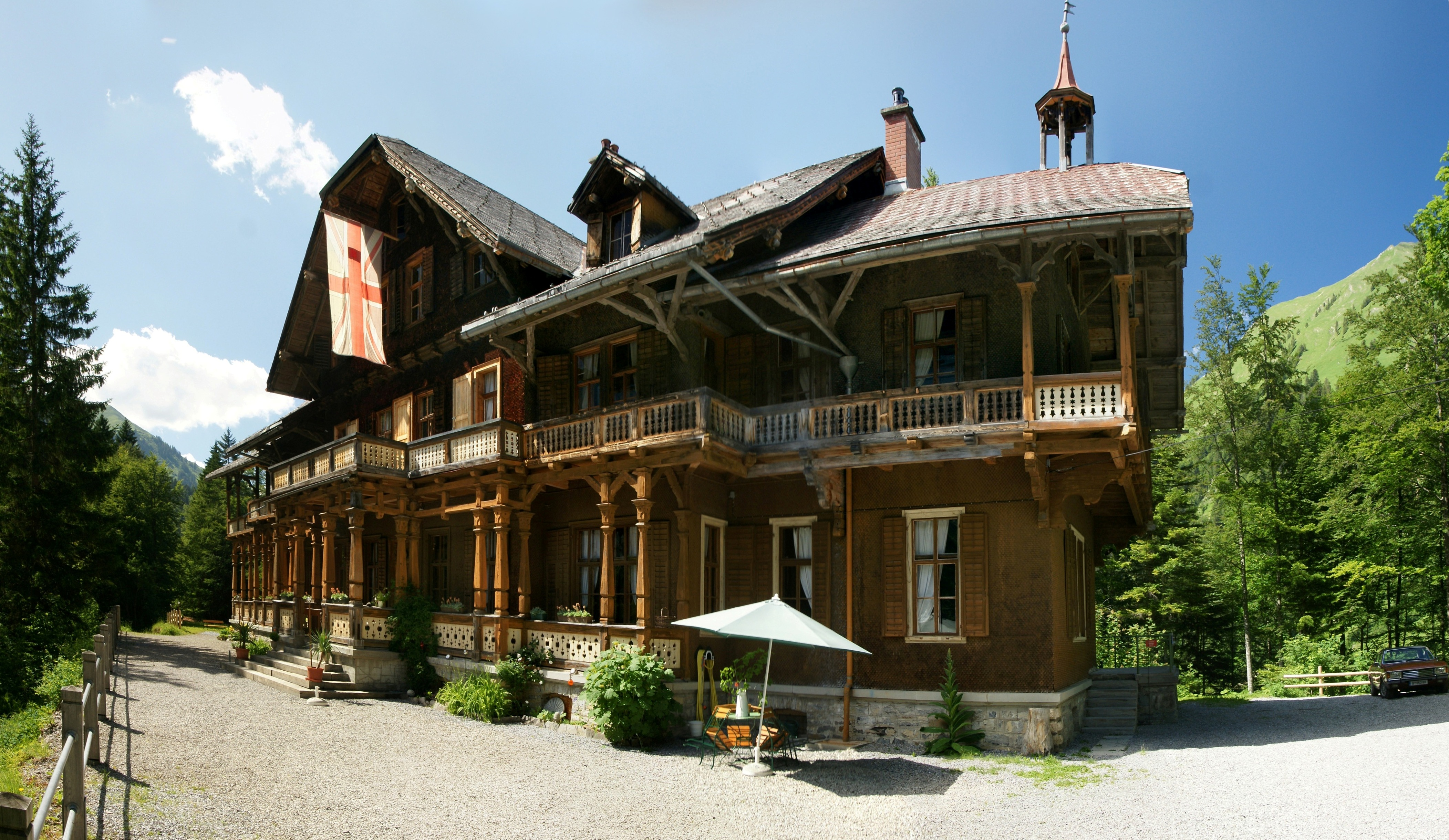 Die Villa Maund wurde 1895 als Jagdvilla im englischen Landhausstil vom Bankier Sir John Oakley Maund, auf dem Ausläufer der Ünschenberg Alp bei Hinterhopfreben erbaut. Im Bild die Westansicht mit Heiterberg. Architekt:William Morris, der Vater der Arts-and-Crafts-Bewegung und Gestalter der Morris Rooms im Victoria and Albert Museum in London; Zimmermannsarbeiten: Johann Anton Strolz aus Schröcken; Innenausbau:Kunsttischler Kaspar Felder.